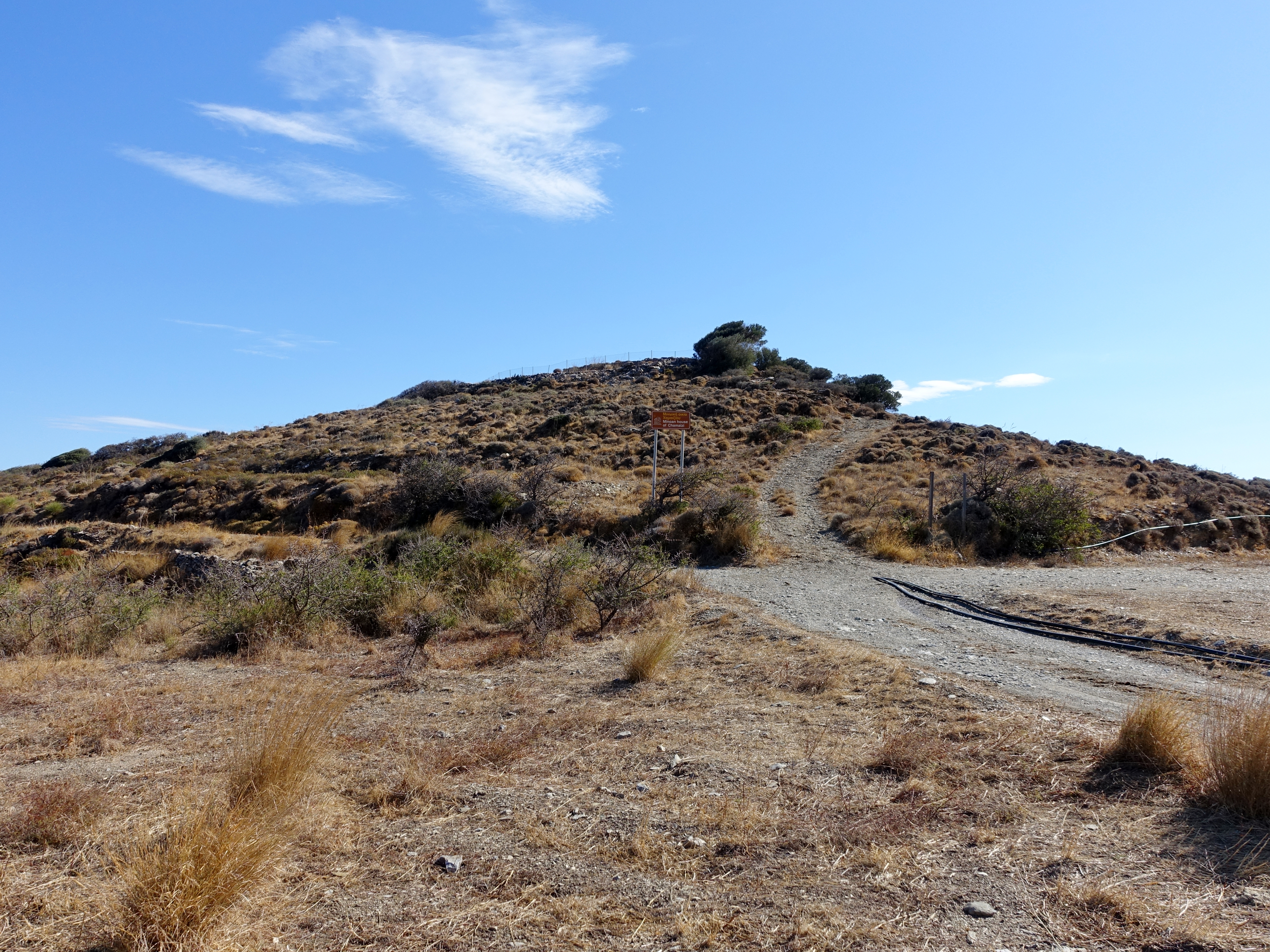 Spitze des Souvloto Mouri (Σουβλωτό Μουρί) mit der Ausgrabungsstätte des Minoischen Hauses von Chamaizi (Χαμαίζι), Gemeinde Sitia, Kreta, Griechenland